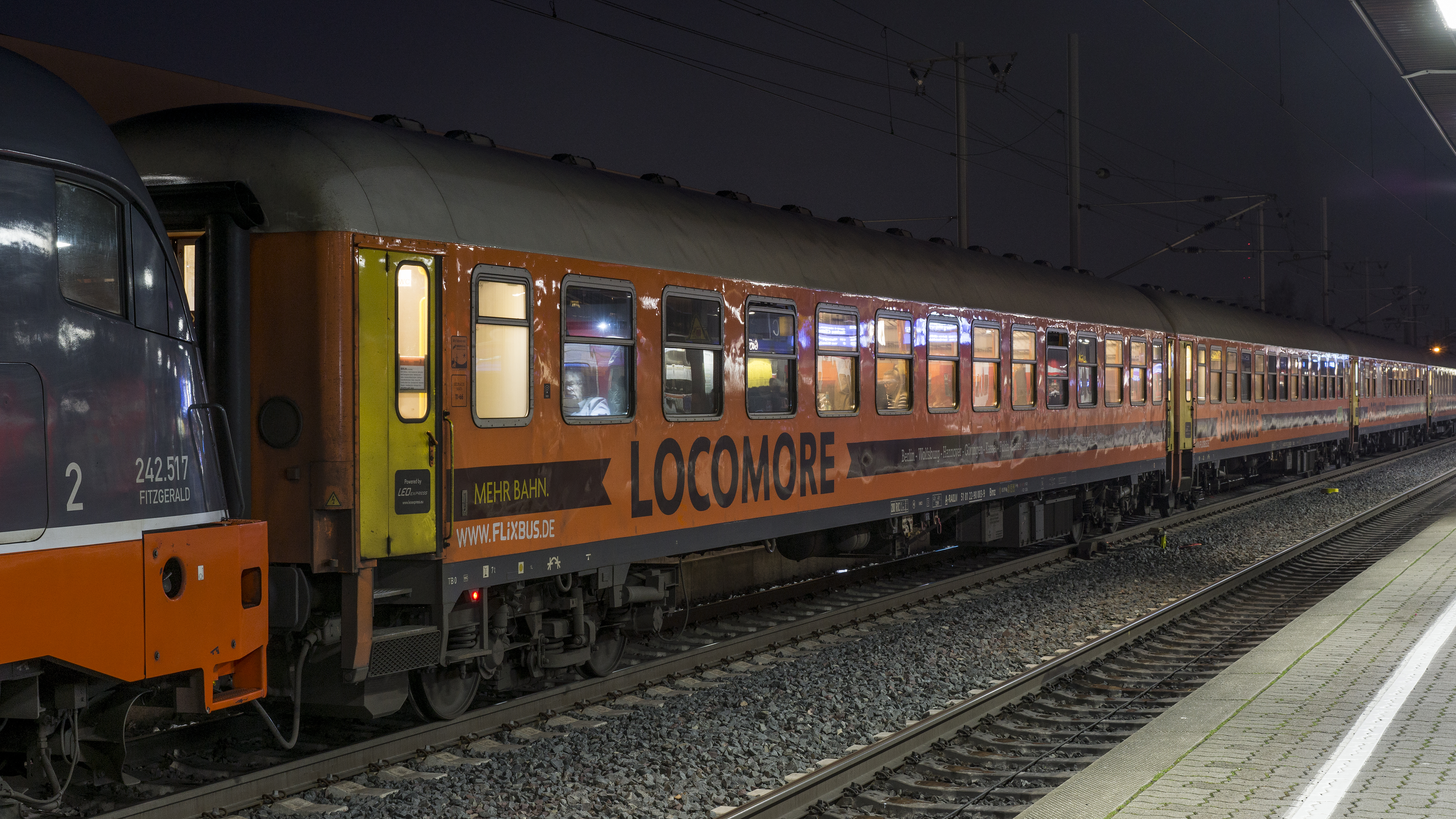 Bmz 51 81 22-90 003-9 A-RAILW LOC 1819 Berlin-Lichtenberg - Stuttgart Hbf Göttingen 26-01-2018 T201801-0128